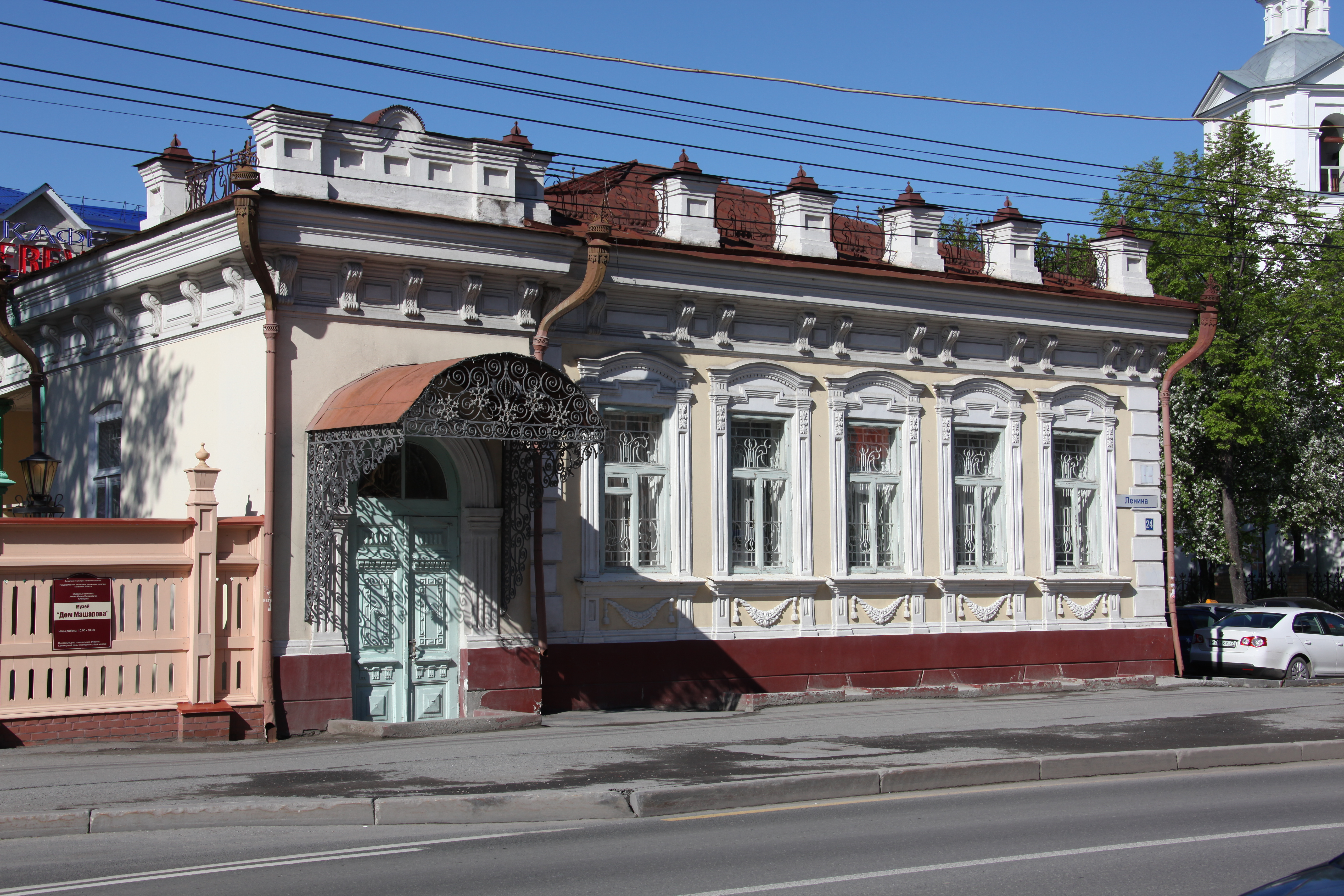 Muzeo de Maŝarov. Tjumeno, Rusio.